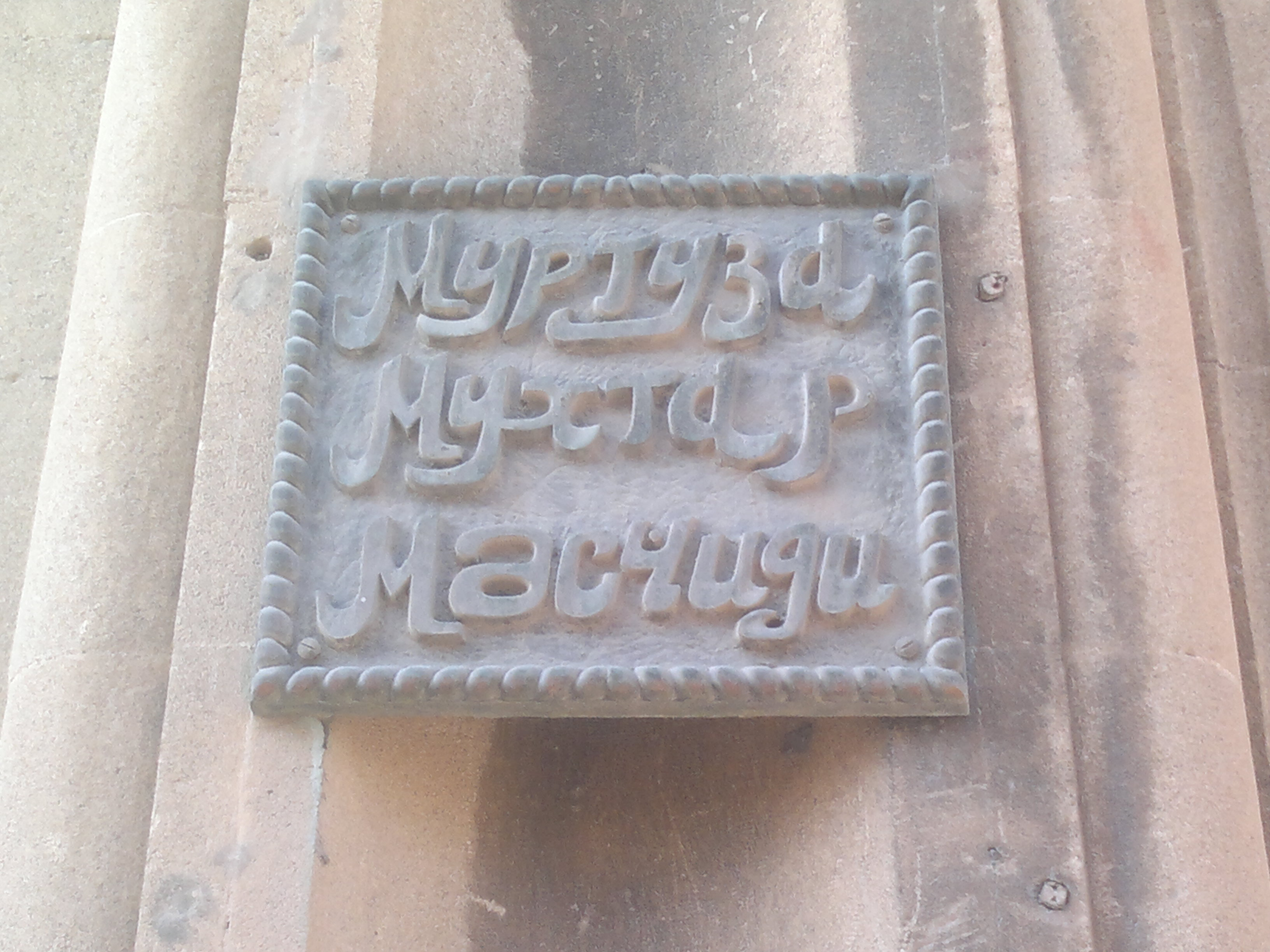 Murtuza Muxtarov məscidi